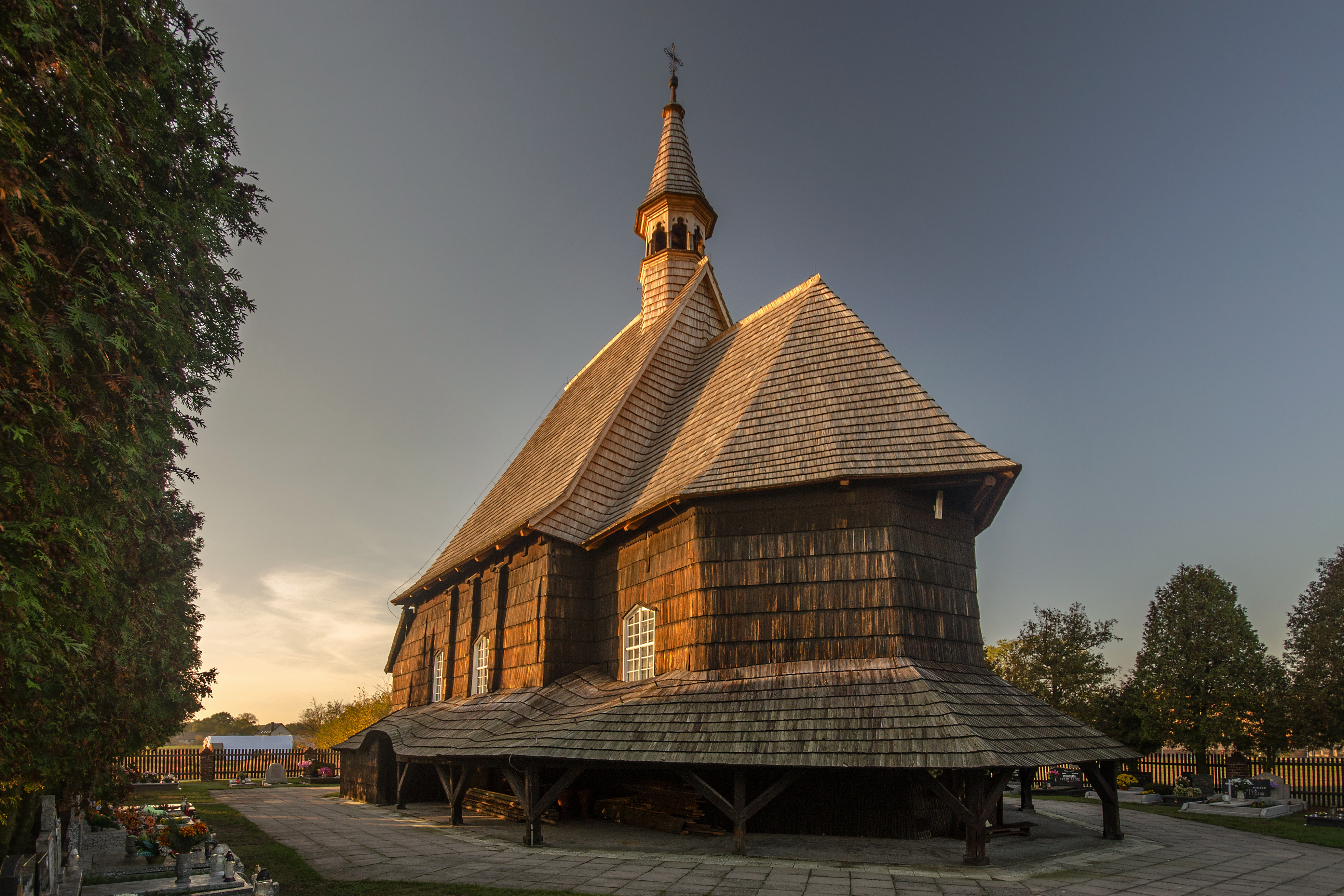 Kolanowice, kościół fil. p.w. św. Barbary, 1678, 1812, ok. 1850, 1934